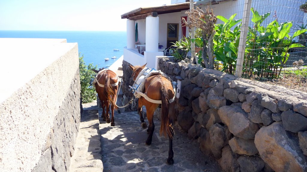 L'únic transport són els asini.